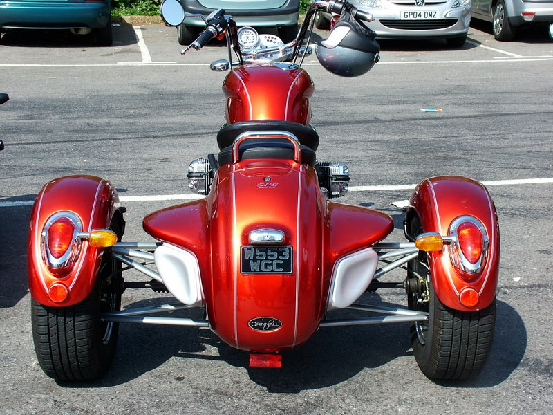 BMW R1200C Grinnall trike